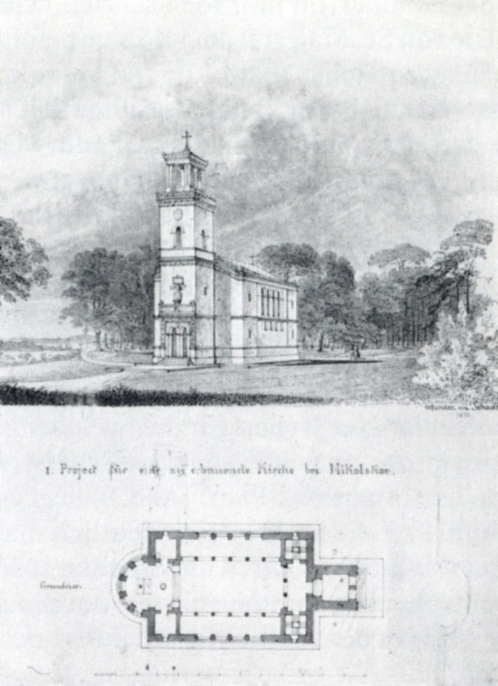 Erster Entwurf A. D. Schadows zur Kirche auf Nikolskoe, 1833